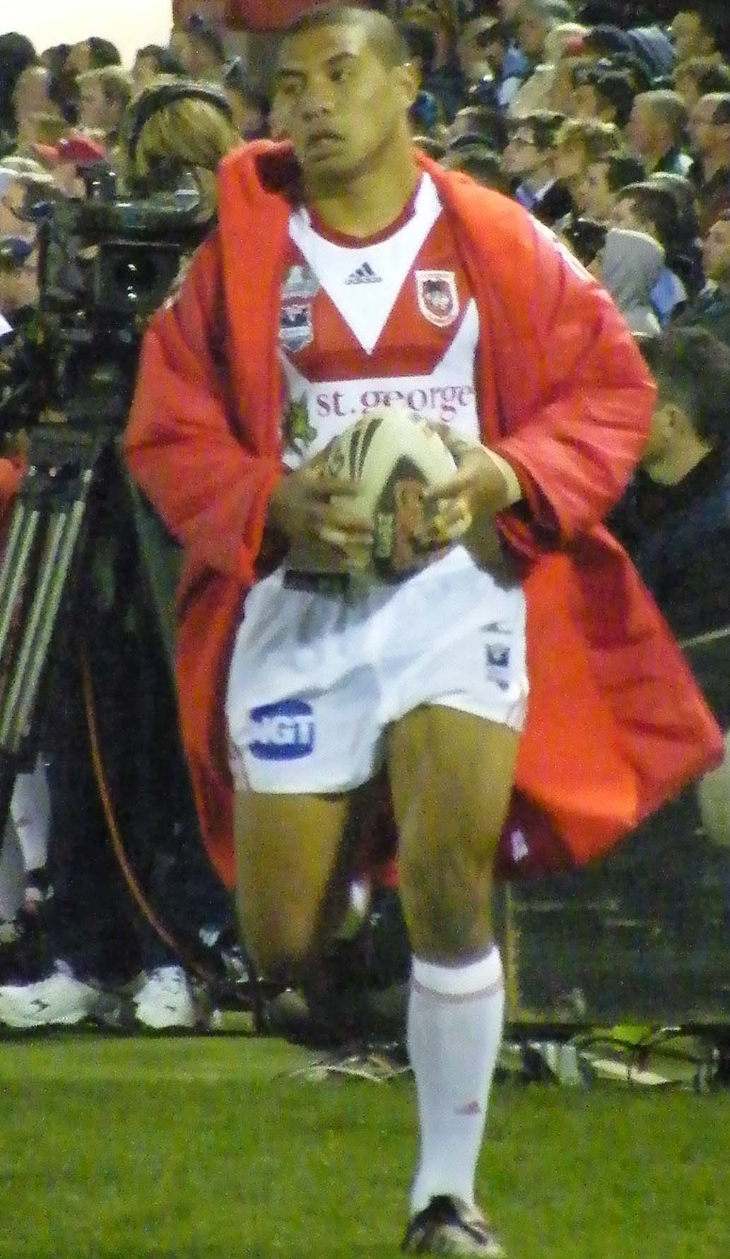 St George Illawarra forward Lagi Setu keeping warm at Toyota Park.